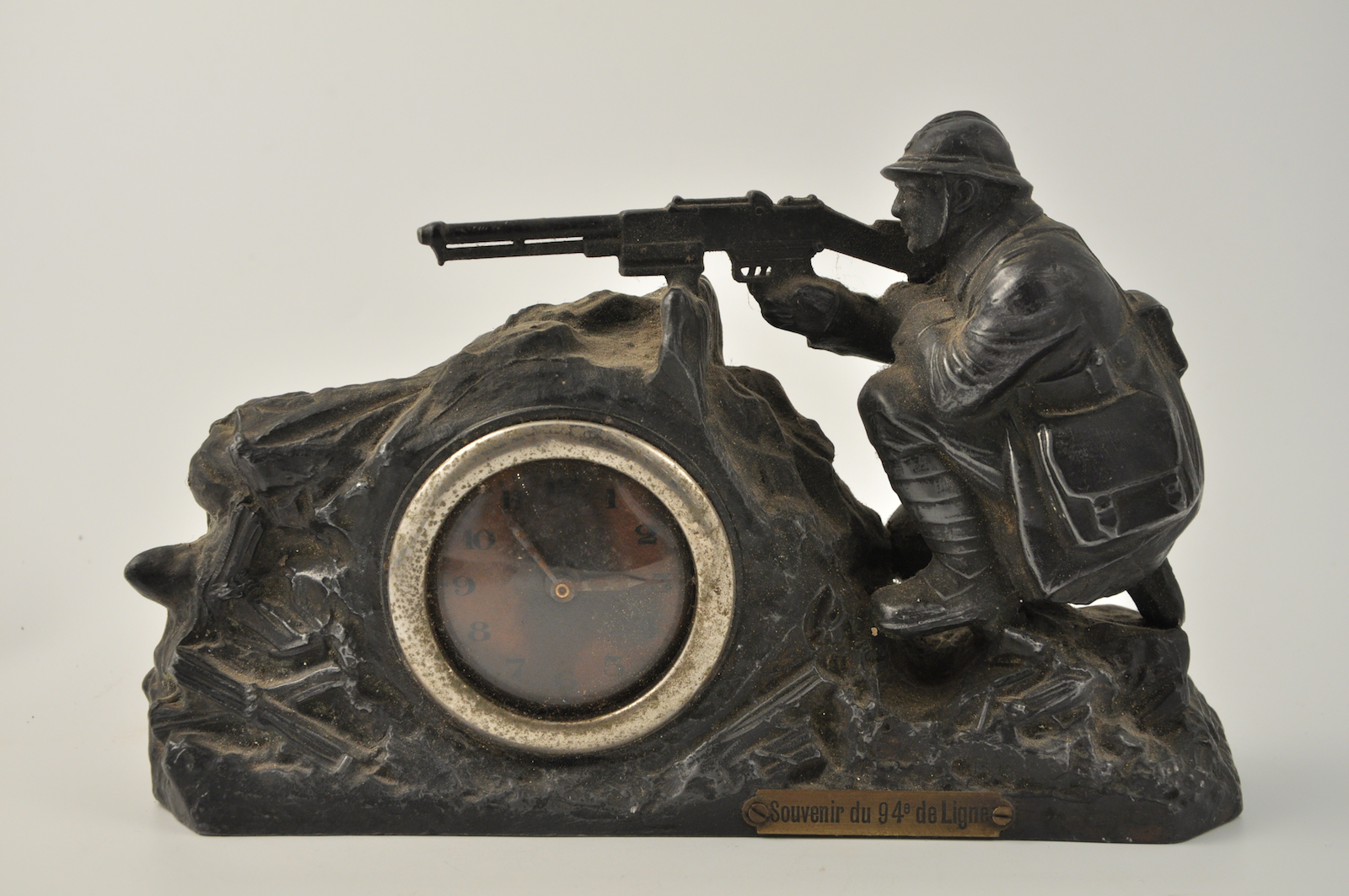 Il testimone presenta due oggetti risalenti al periodo della grande guerra: una cassettina in legno portaoggetti austriaca riporta la scritta EMILEK IK 1917 intarsiata con foglie e decorazioni, acquistata in un mercatino dell'antiquariato e un orologio inserito in una scultura, rinvenuto a Verdun (Francia) da un suo parente.